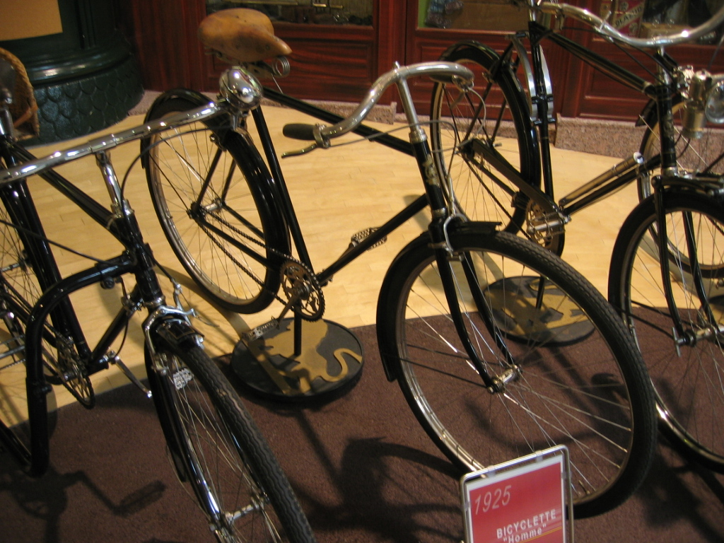 Velos Peugeot - Musée Peugeot Sochaux